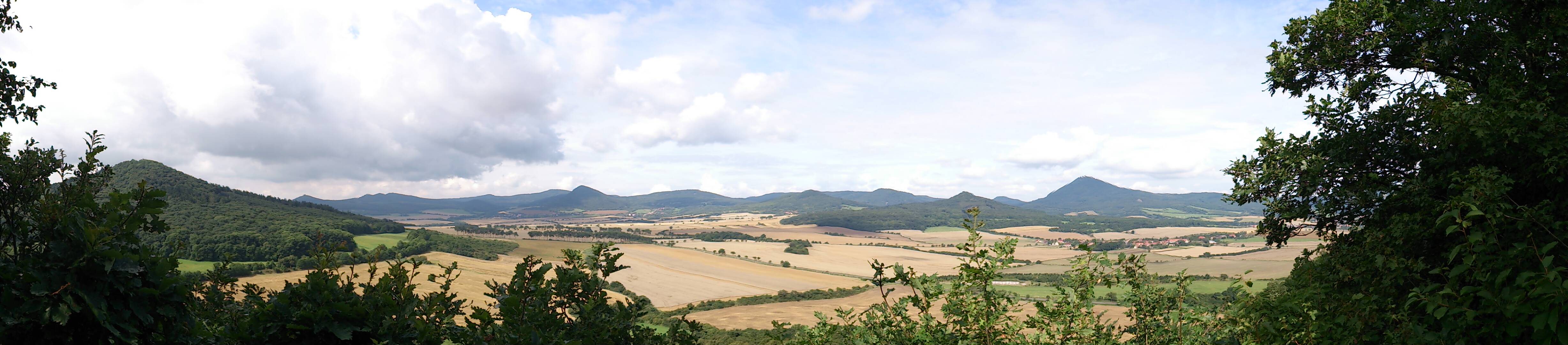 Panoramatický pohled z první vyhlídky pod vrcholem Borečského vrchu